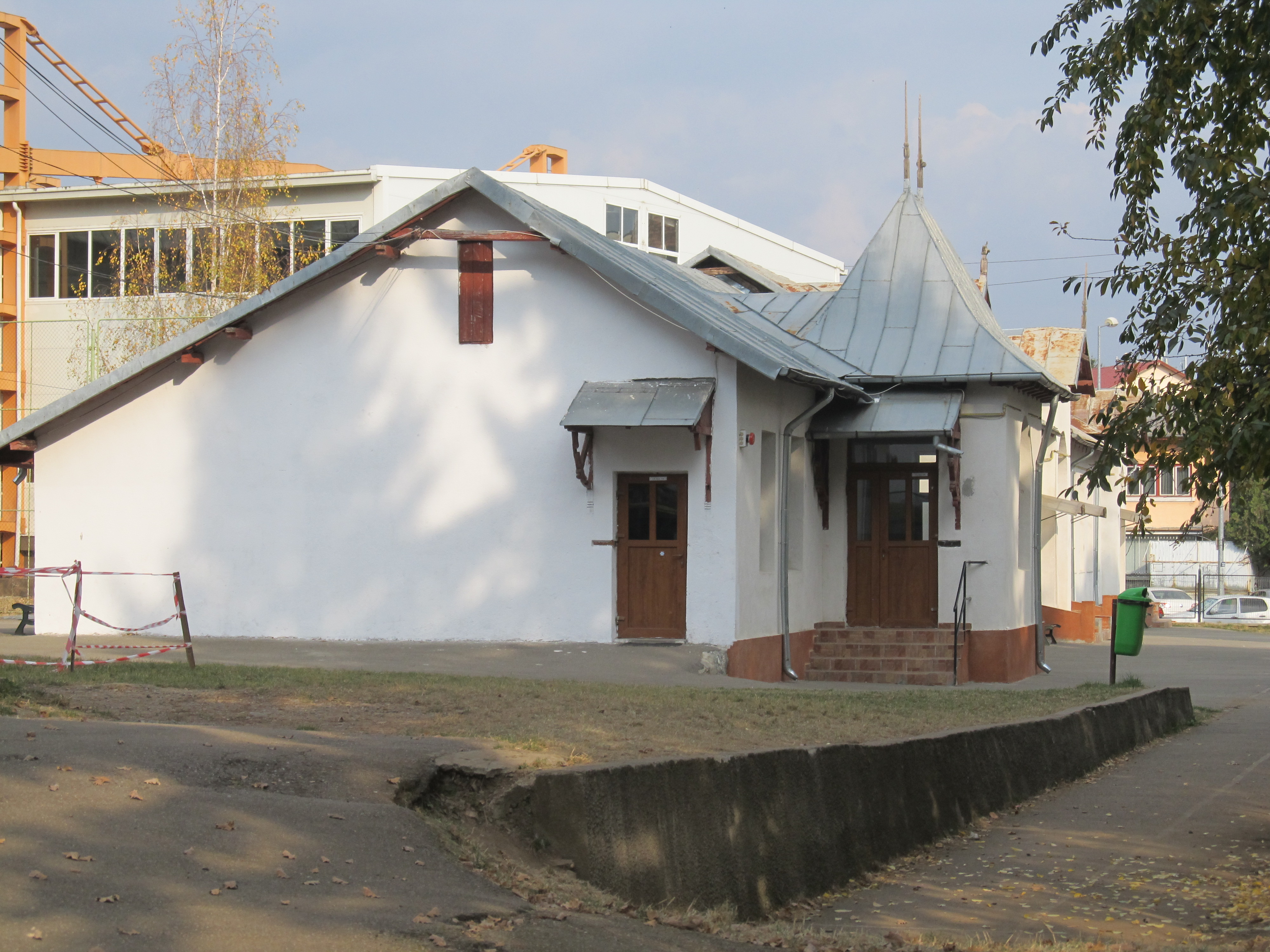 Școala Domnească, azi anexă a Colegiului Național „Nicolae Grigorescu” Câmpina.